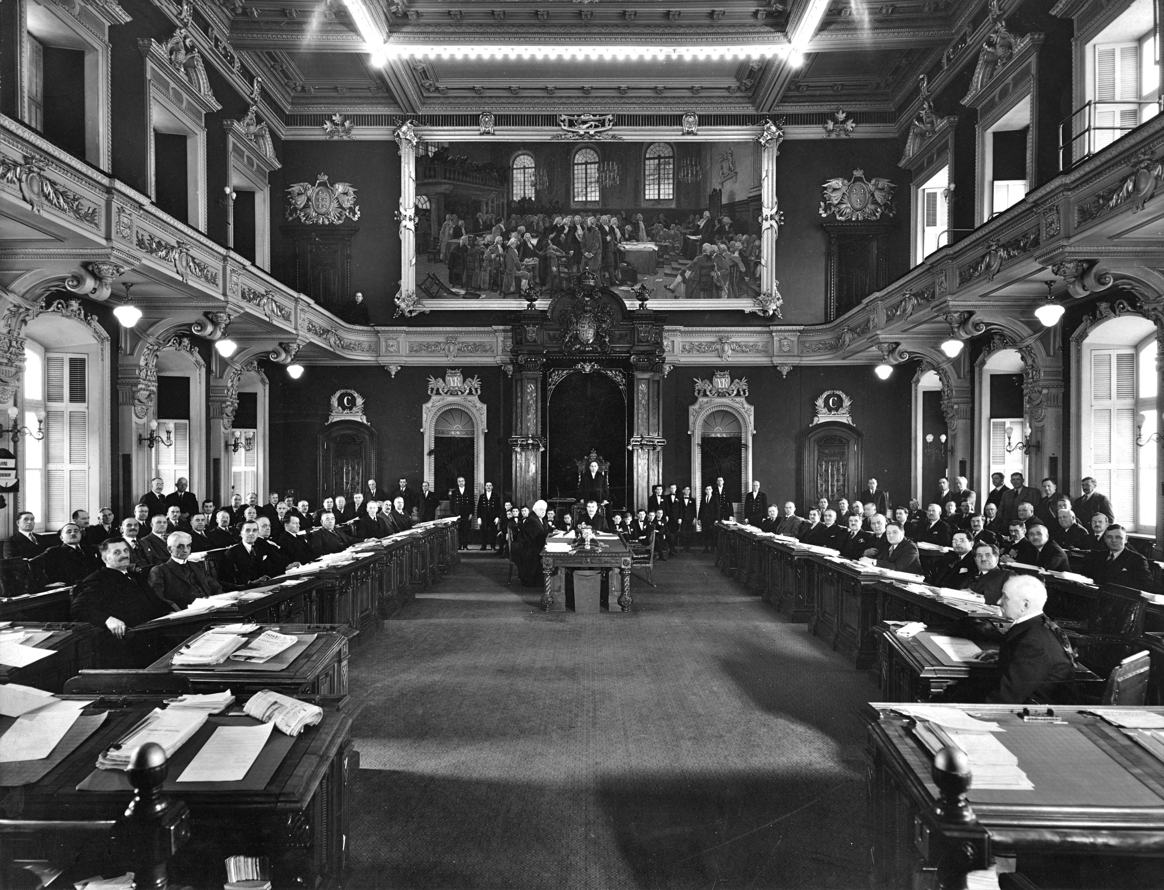 Assemblée législative de la province de Québec, mercredi 5 avril 1933